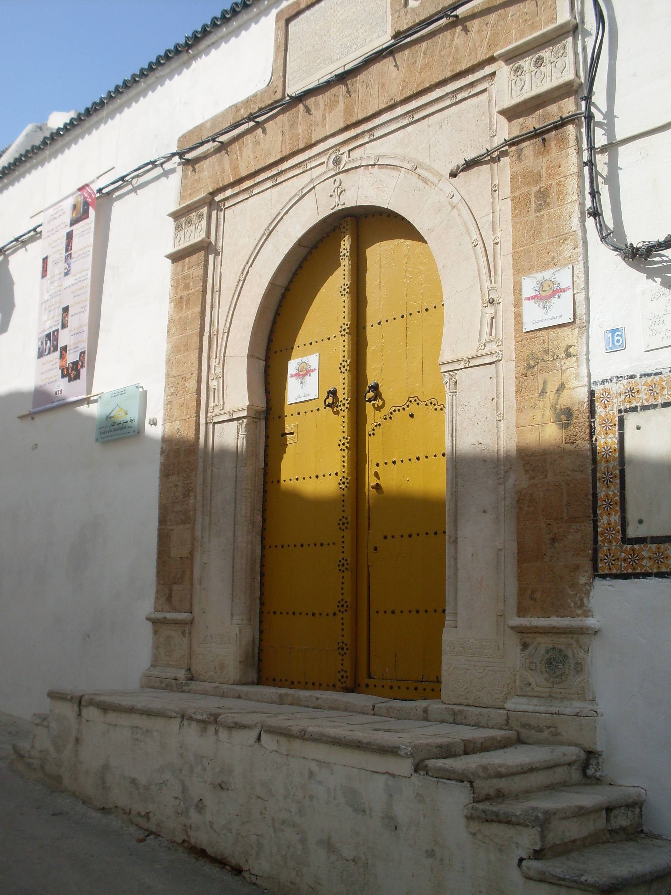 Zaouïet Sidi Abdelkader, Rue Diwan, Médina de Tunis